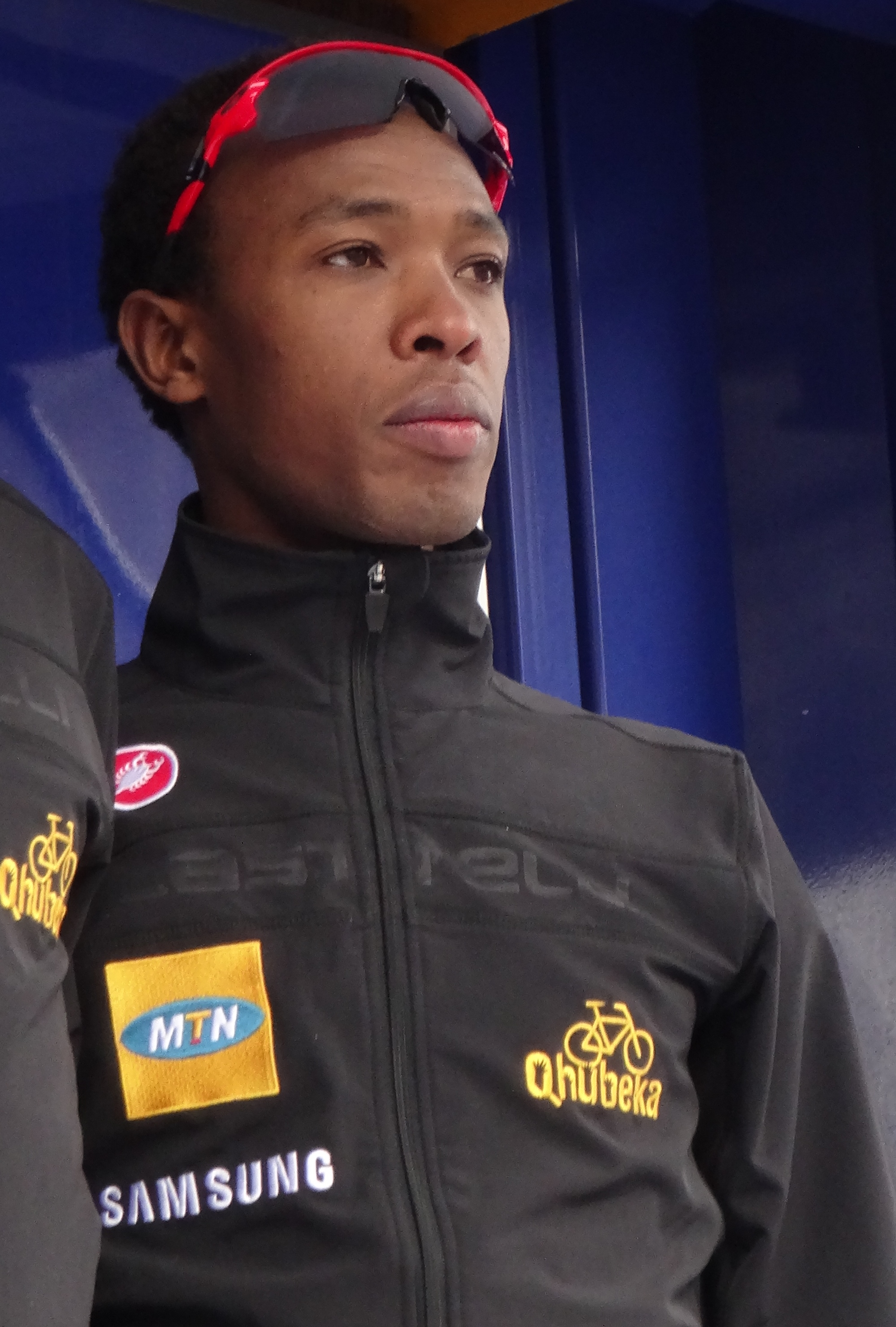 Reportage photographique réalisé le mercredi 7 mai 2014 au départ de la première étape de l'édition 2014 des Quatre jours de Dunkerque à Dunkerque, Nord, Nord-Pas-de-Calais, France. Depicted person: Adrien Niyonshuti Depicted team: MTN-Qhubeka